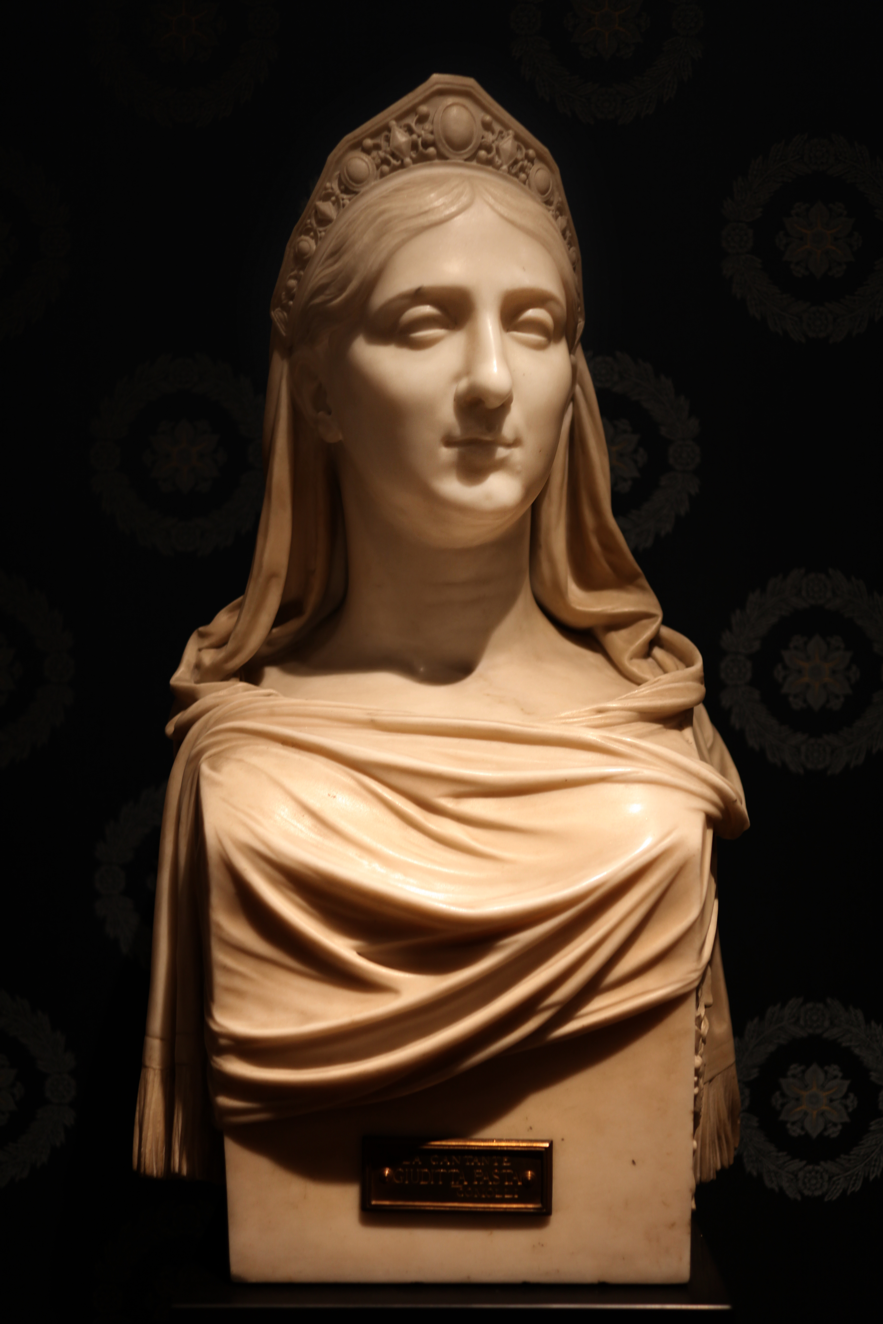 G.B. Comolli (1775-1830) Busto di Giuditta Pasta (1829), Museo del Teatro alla Scala; la cantante è ritratta nei panni di Semiramide. L'opera venne presentata dal Comolli all'Esposizione di Brera del 1829.